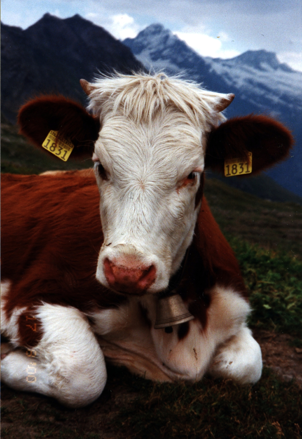 Schweizer Kuh bei Grindelwald